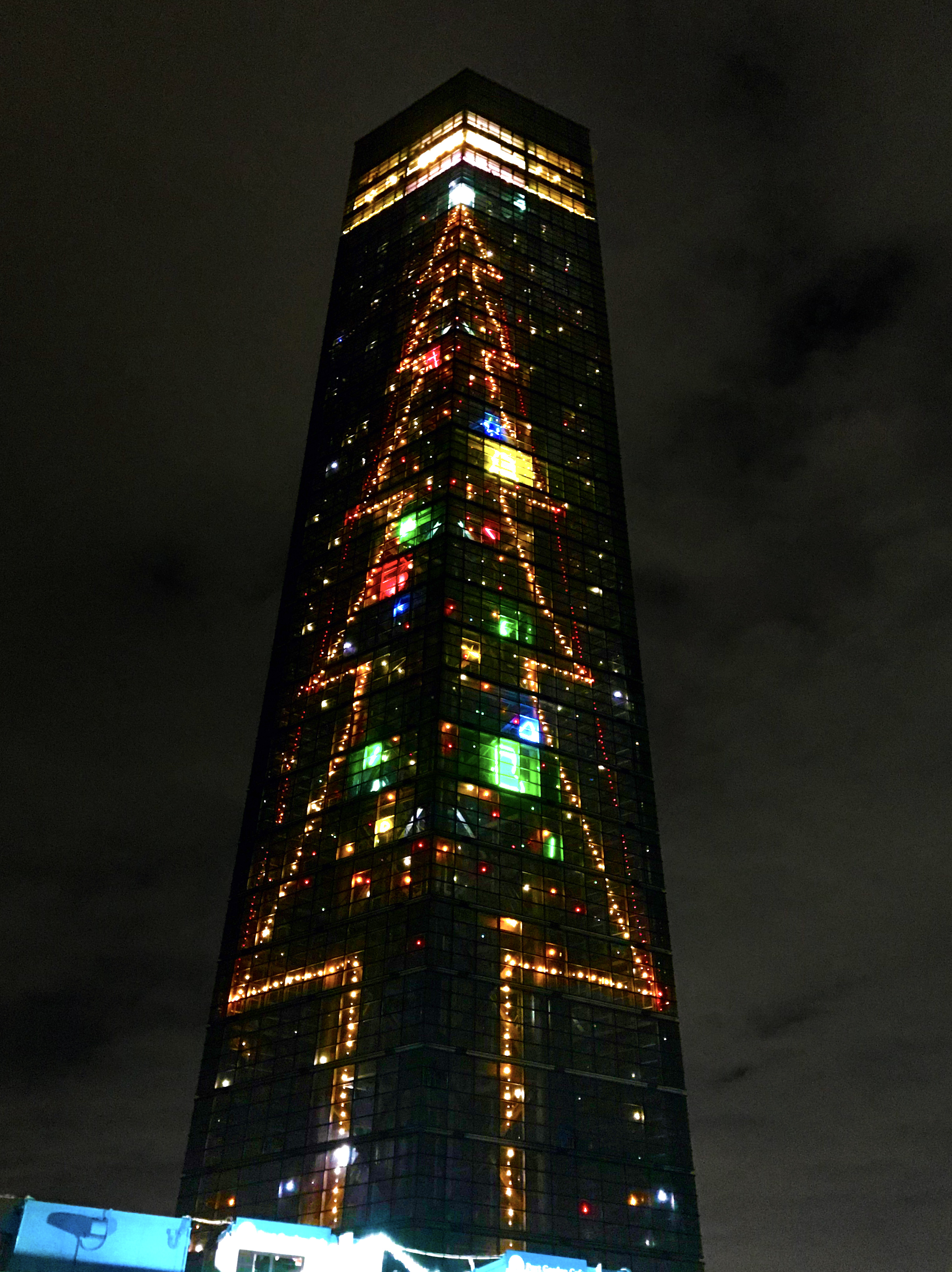 Chiba Port Tower Xmas Illumination